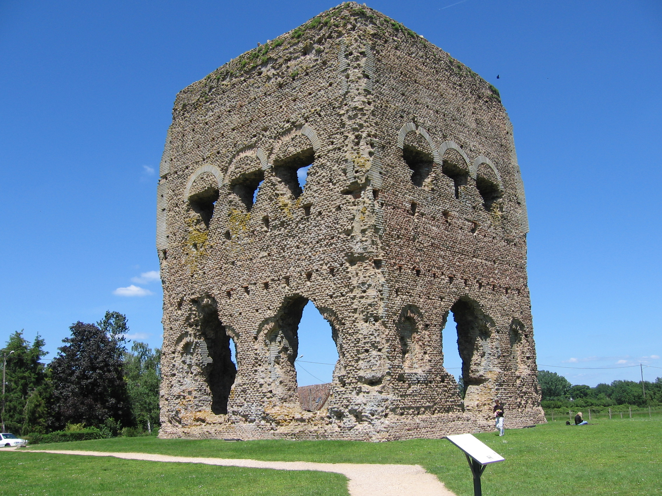 Temple de Janus - Ville d'Autun .